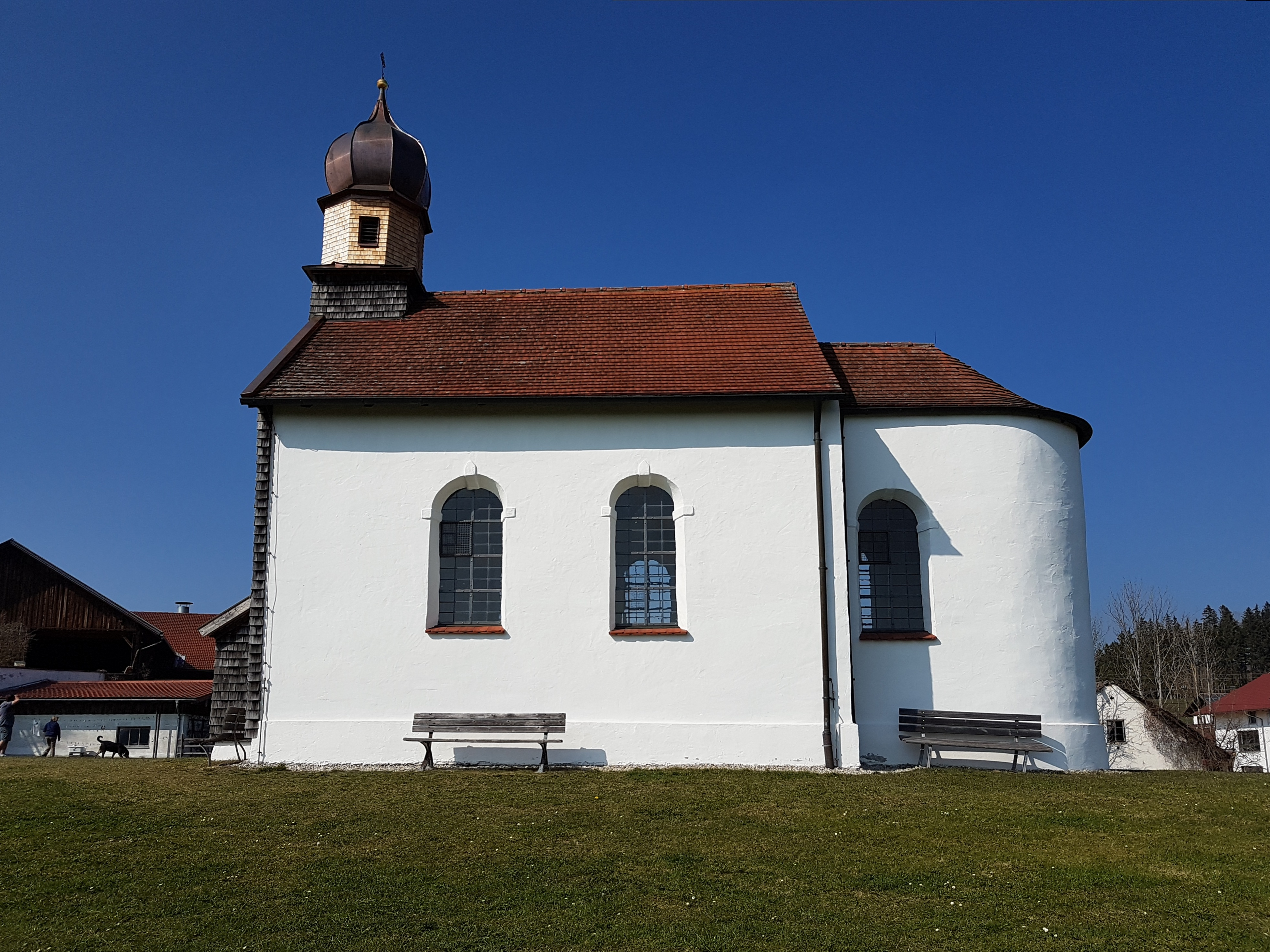 St. Michael (Kienberg), Ansicht von Süden.